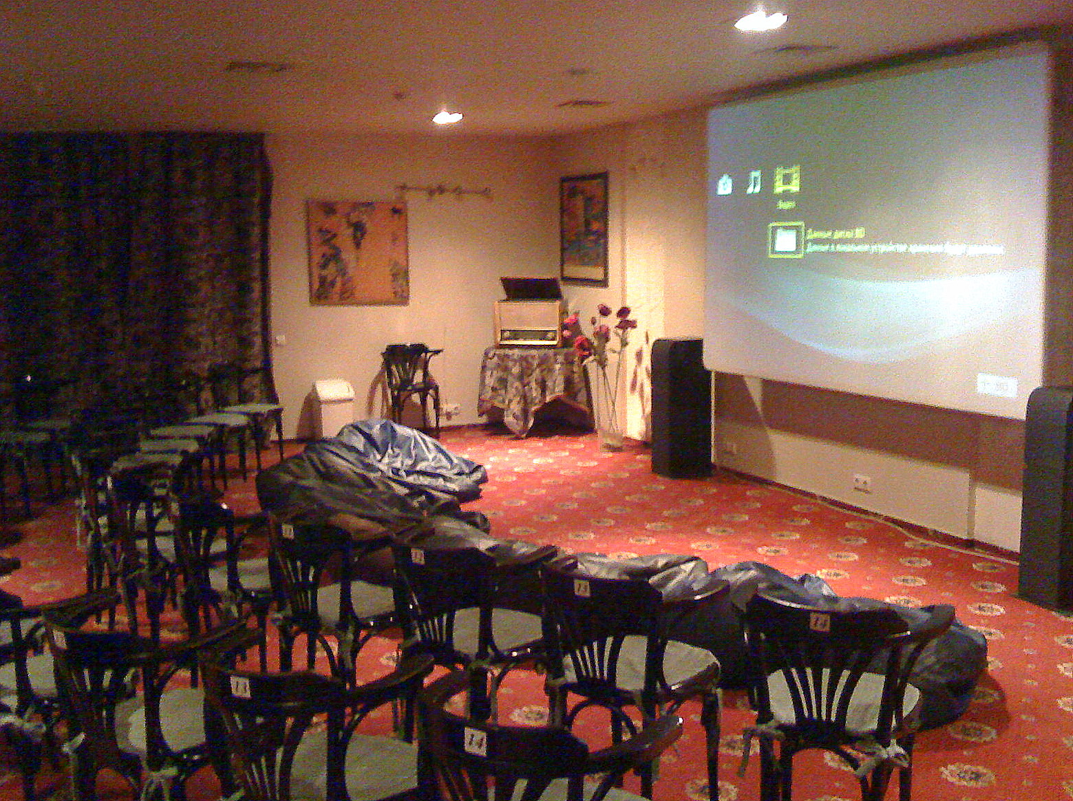 Здание кинотеатра Художественный - один из старейших кинотеатров г.Москвы: Арбатская пл., дом 14, строение 1, Арбат, Центральный округ, Москва